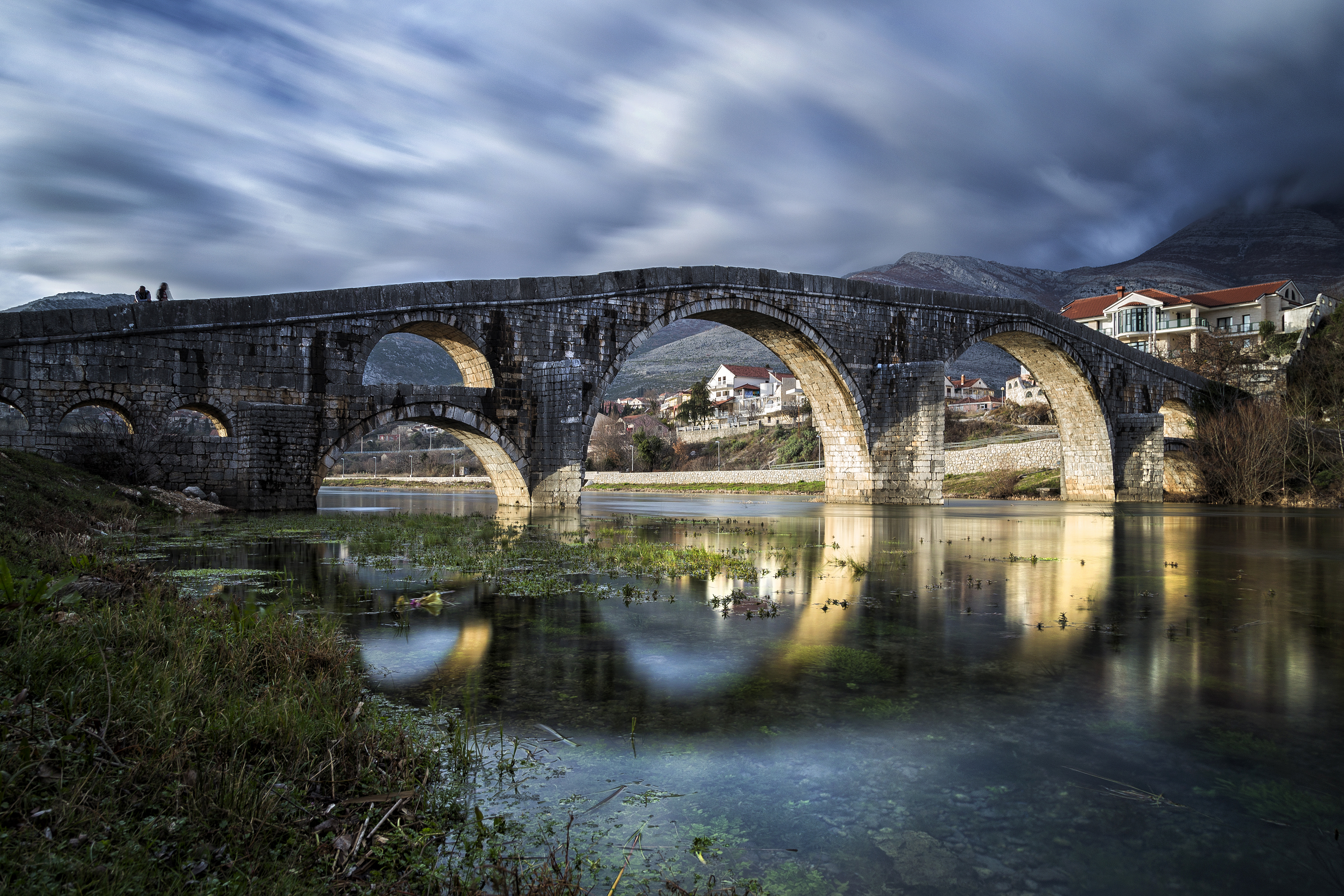 Арсланагића мост на ријеци Требишњици је подигао Мехмед Паша Соколовић, а отворен је 1574.године. Био је то мост који је повезивао централну Босну и Нови (данашњи Херцег Нови, тада у саставу Босне у оквиру Османског царства)